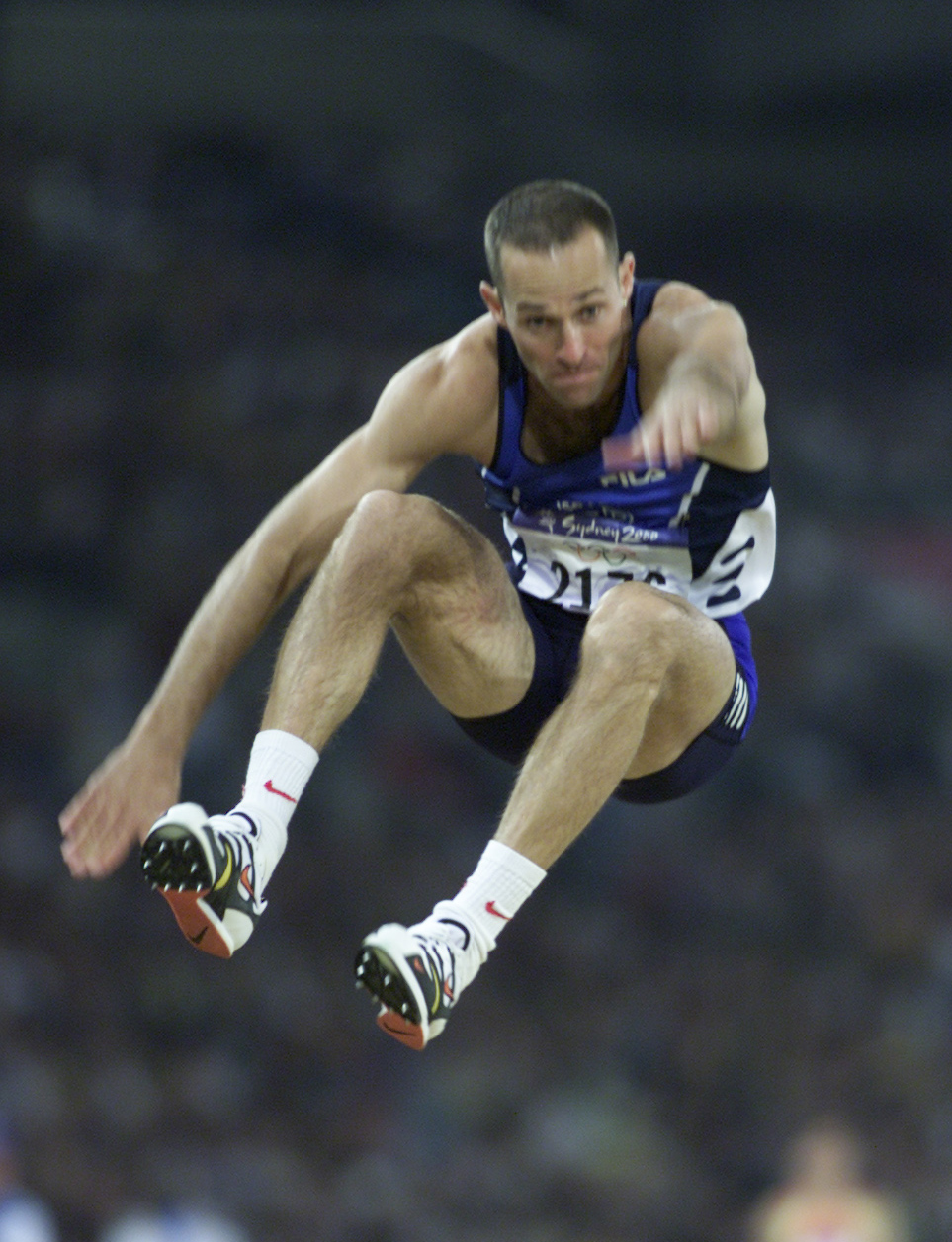 רוגל נחום הוא אתלט עבר ישראלי שהתמחה בקפיצה משולשת.